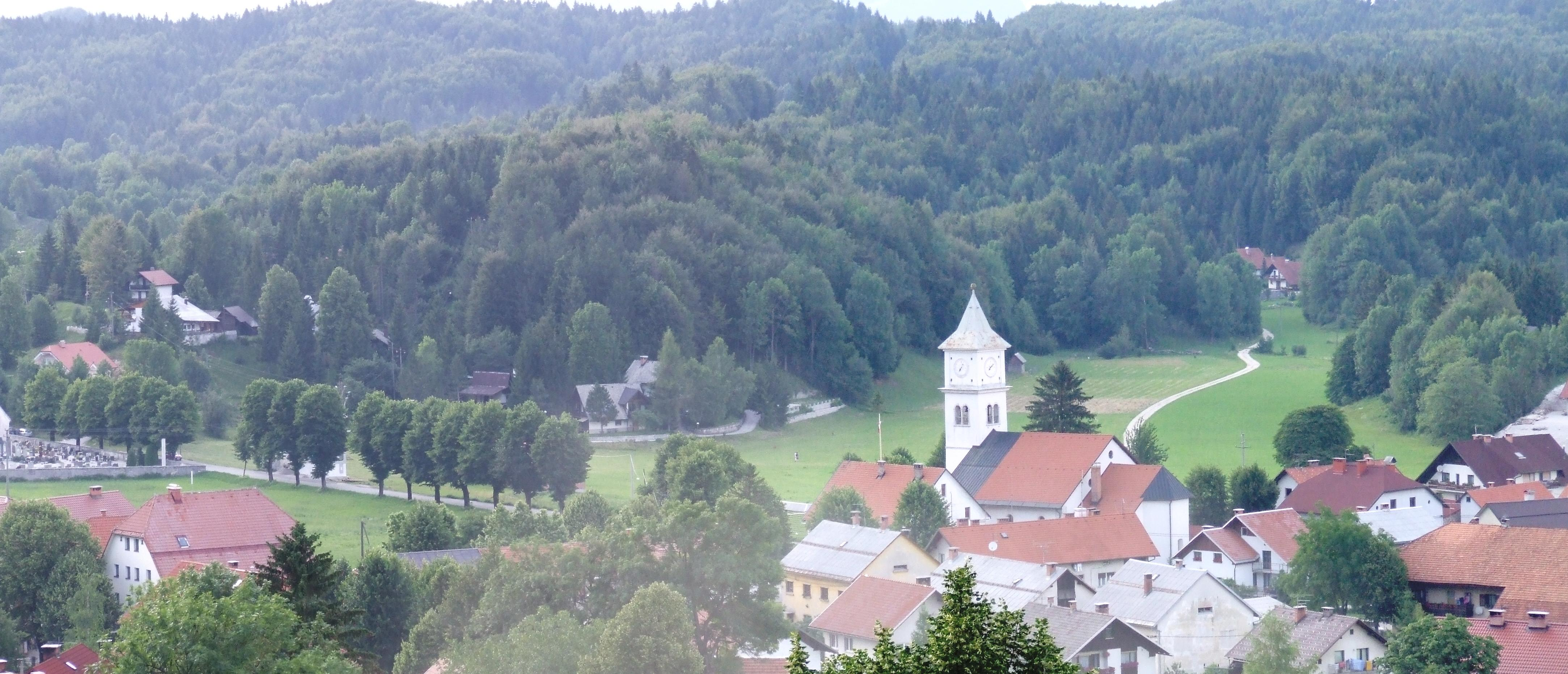 Monte Nero sopra Idria